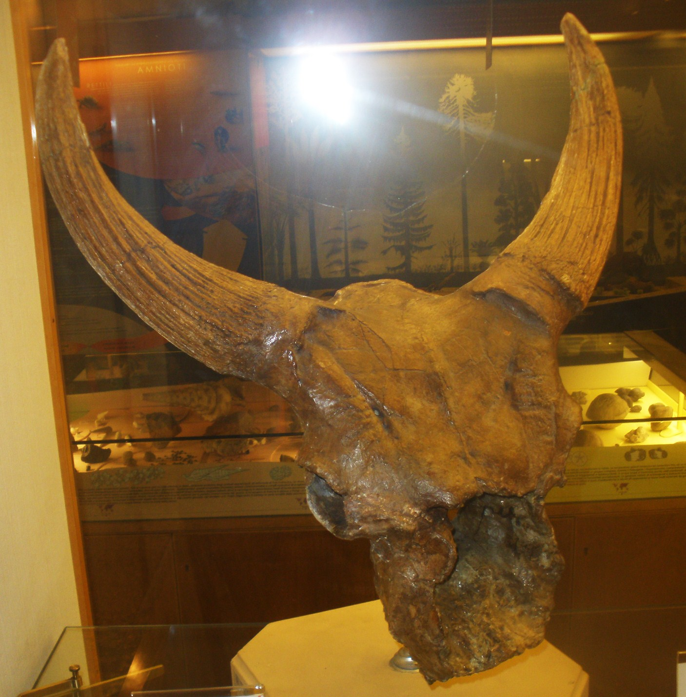 Fossil of Leptobos, an extinct mammal- Took the picture at Museo di Paleontologia di Firenze